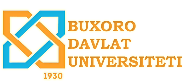 Oʻzbekcha/ўзбекча: Buxdu logos